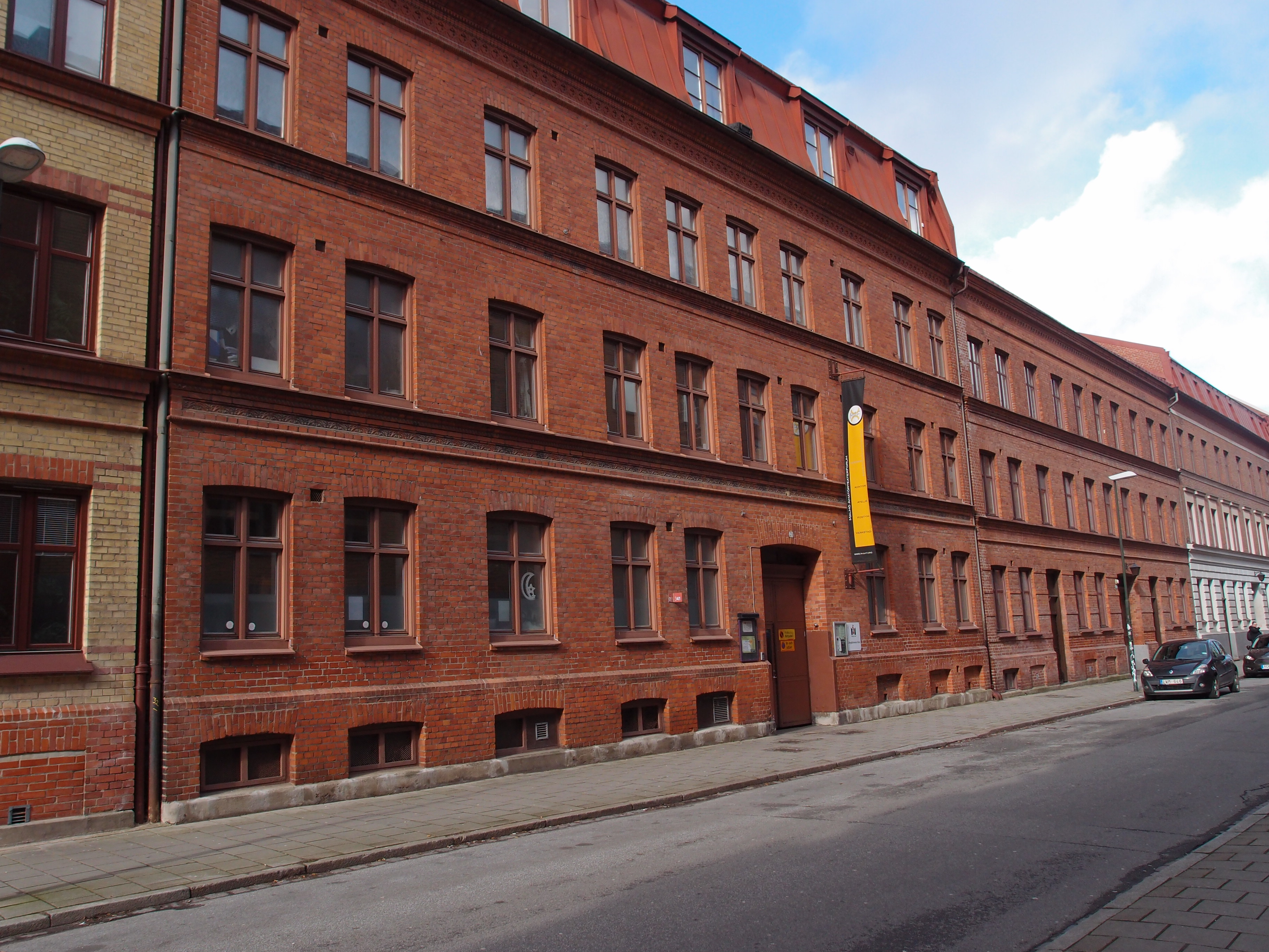 Ungdomens hus på Torpgatan 21 i Malmö, Ungdomens hus. Huset uppfördes 1893 som Folkets hus.